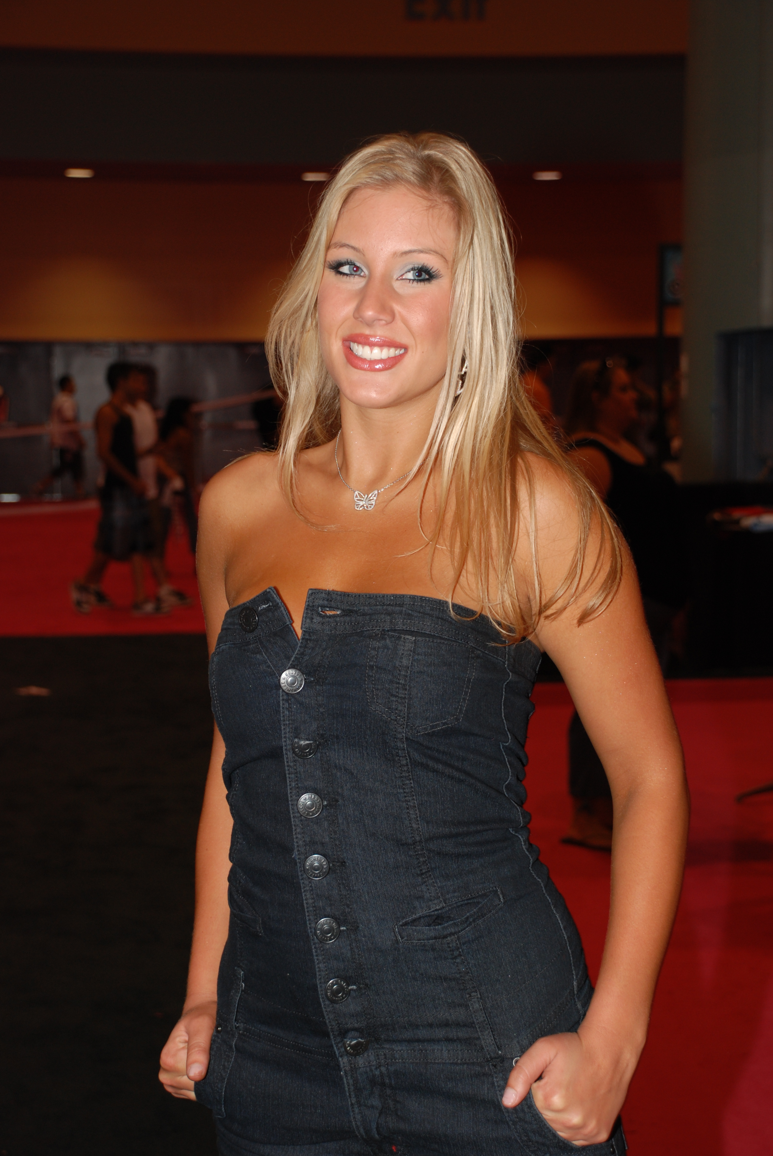 Miami Eroticaxxx 5-9-09 Nikon 069